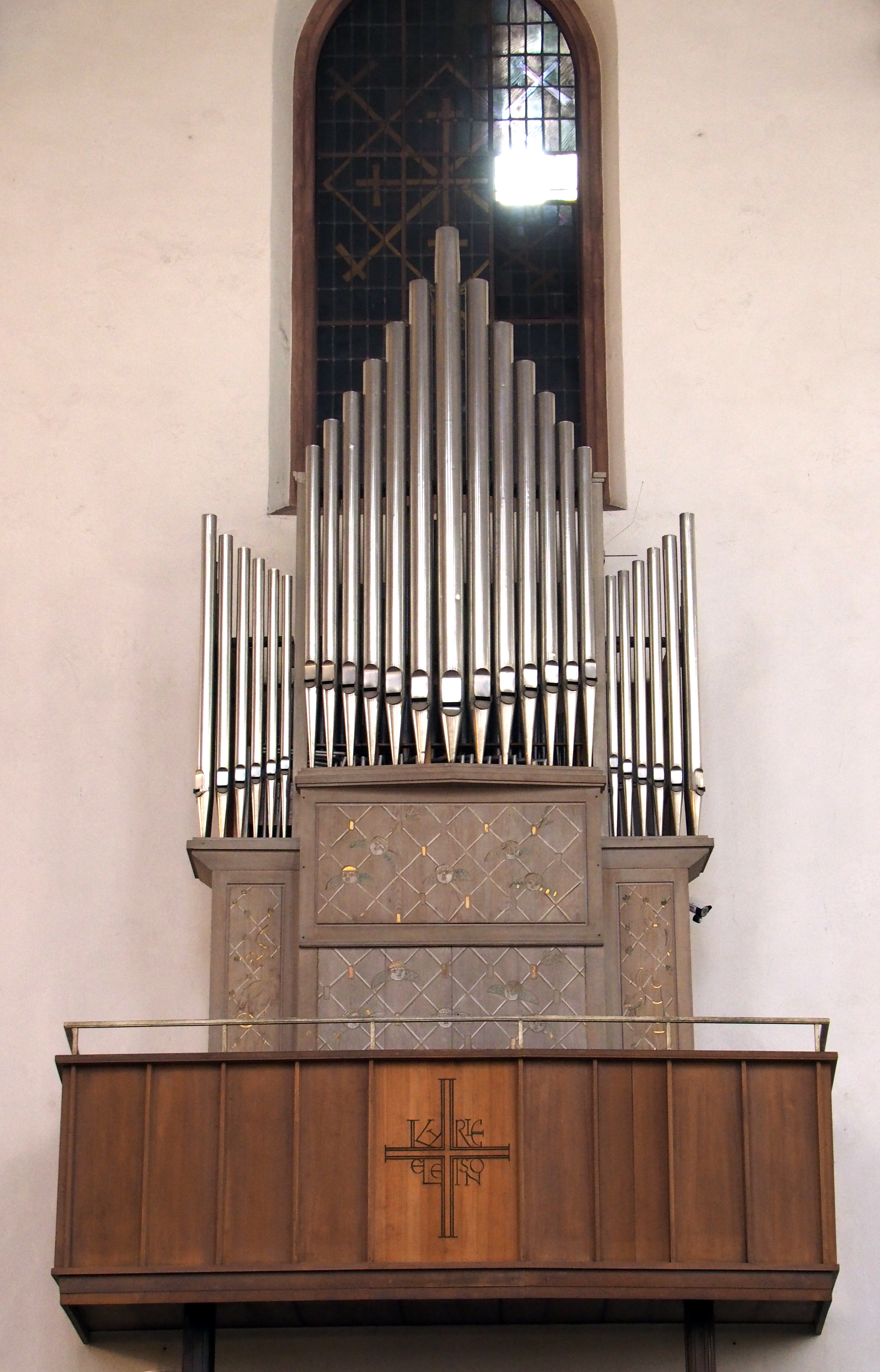 Chororgel von Orgelbauer Walcker in der Katharinenkirche Frankfurt am Main